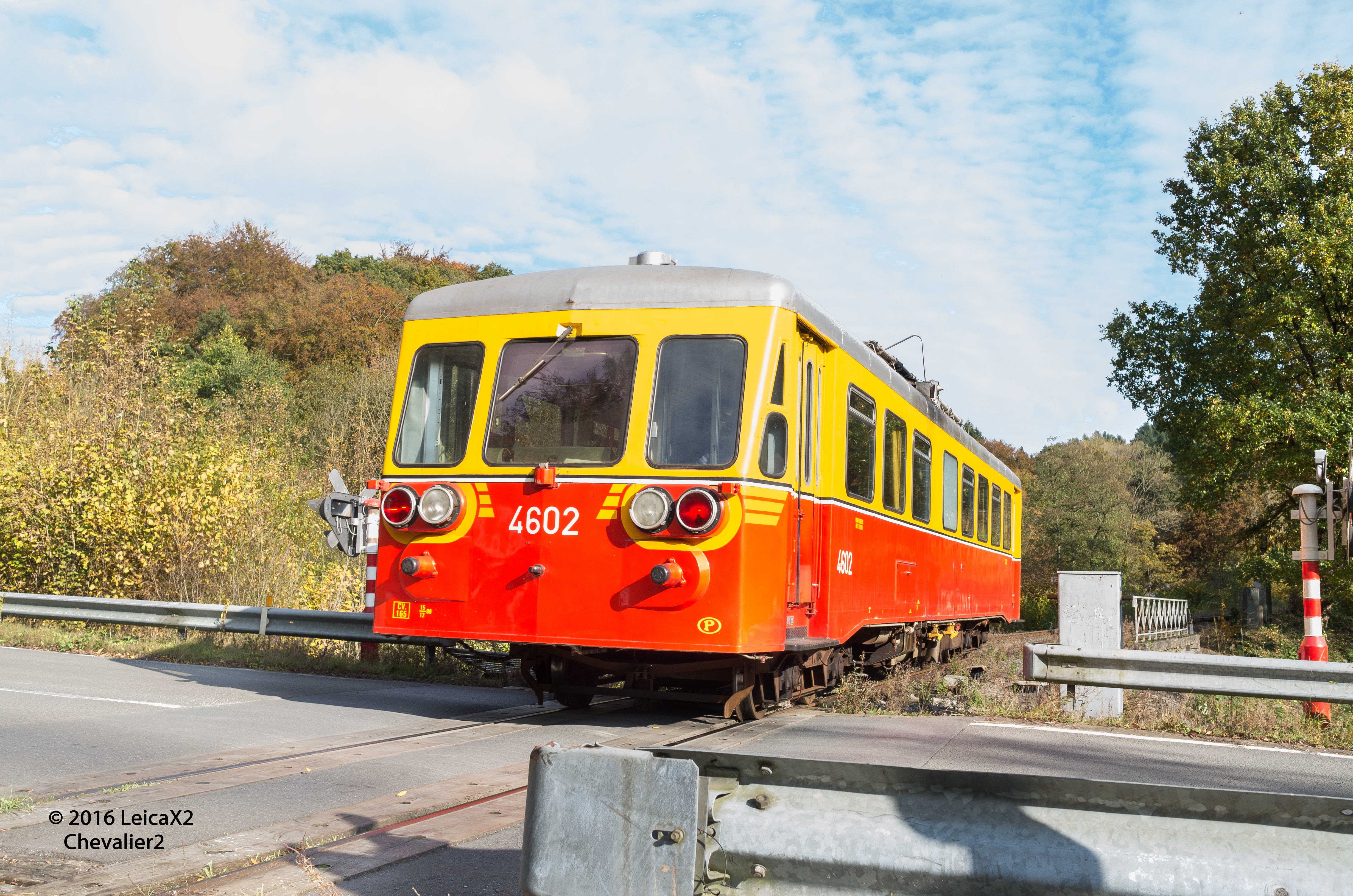 Autorail 4602 du PFT-TSP